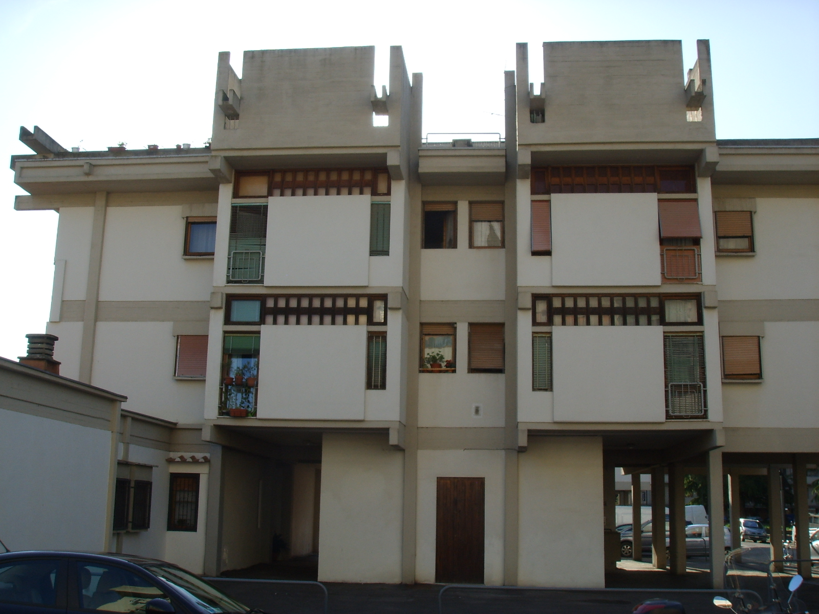 Edificio E di Sorgane